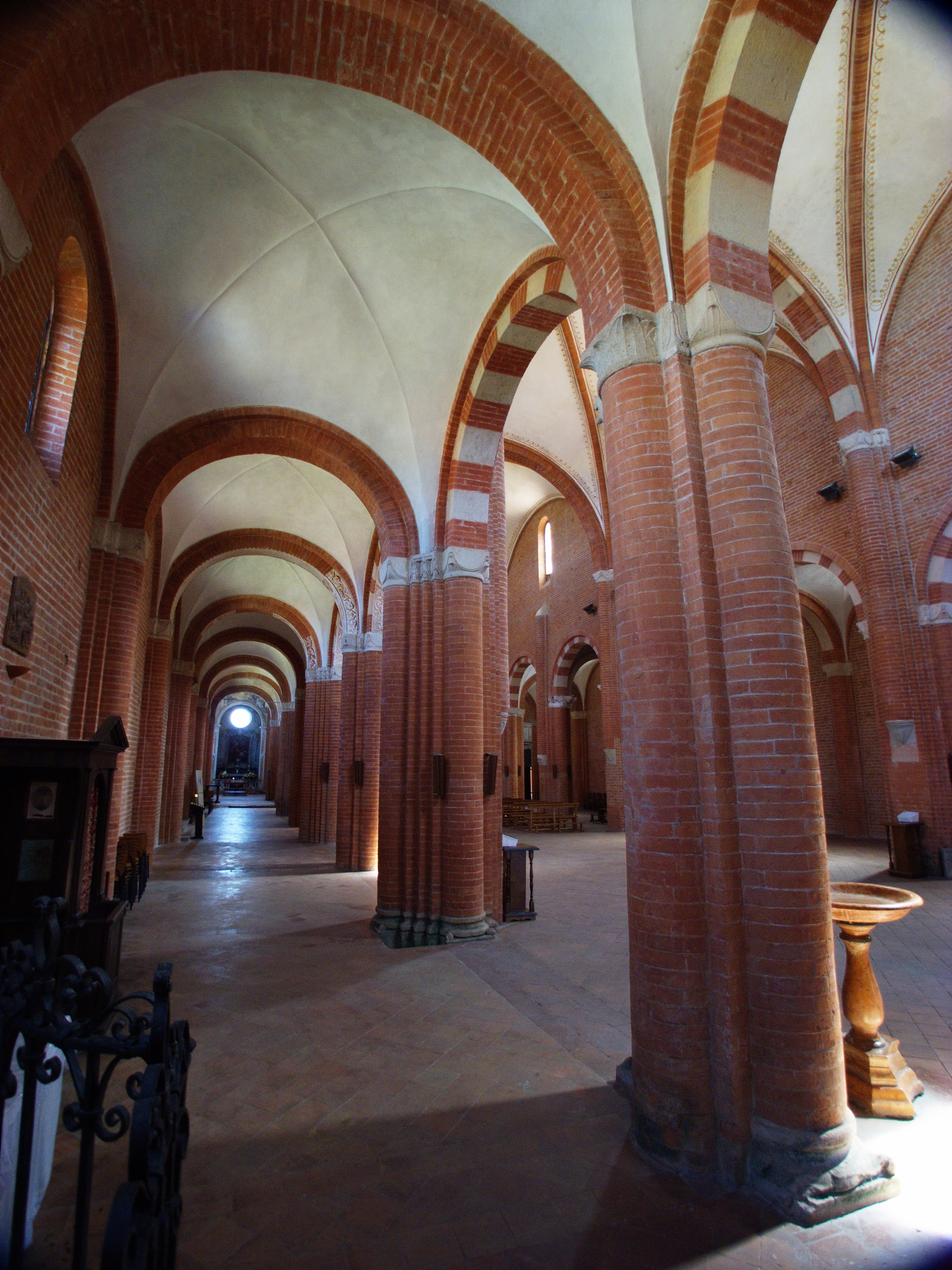 Abbazia di Chiaravalle della Colomba : Collaterale nord / Chiaravalle della Colomba : Northern Collateral